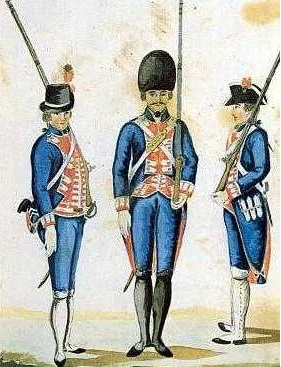 Guardia Valona de España en el siglo XVIII. Dibujo realizado por el Conde de Clonard, Serafín María de Sotto, en el siglo XIX